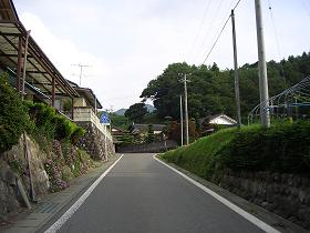 長野県道210号西伊奈線 中沢集落の写真